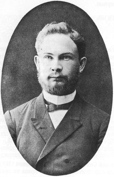 Русский религиозный философ Виктор Иванович Несмелов